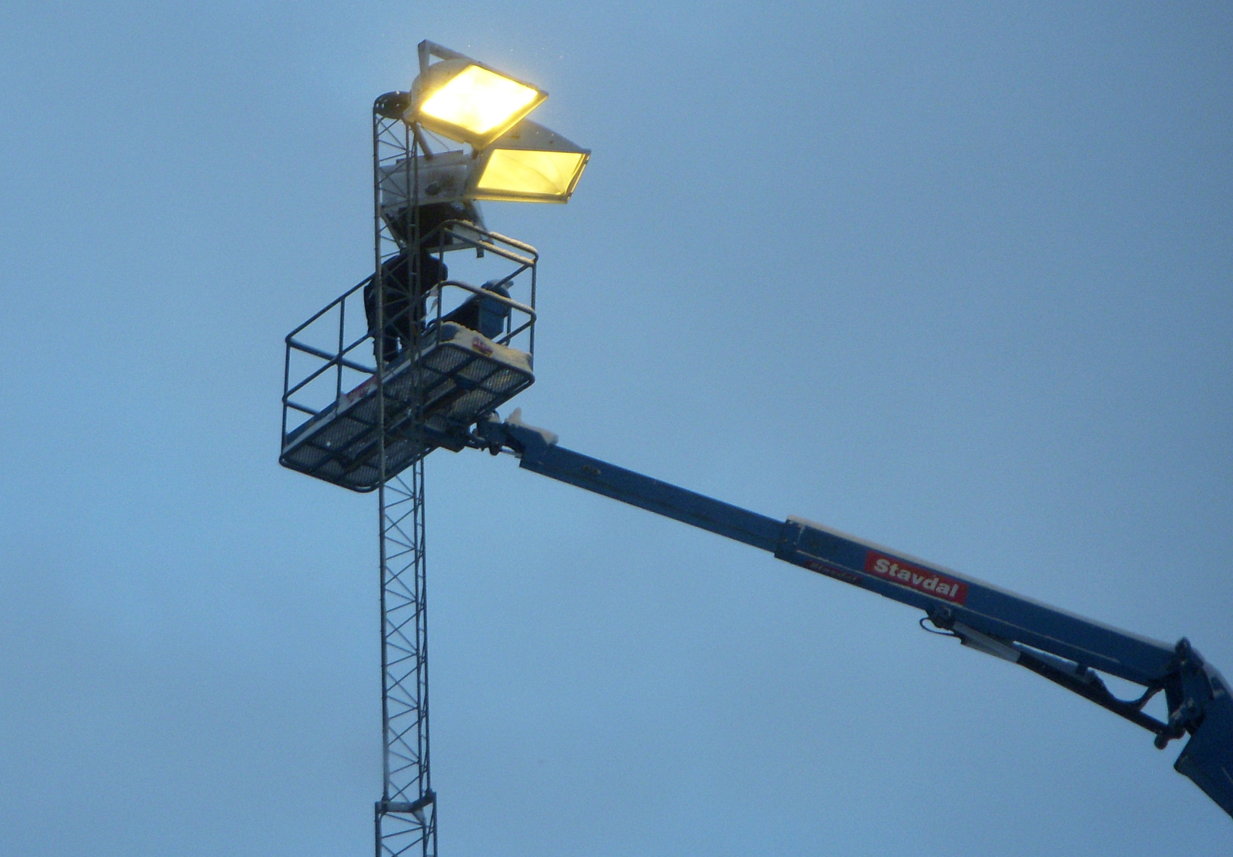 Service på en belysningsmast i Stockholm